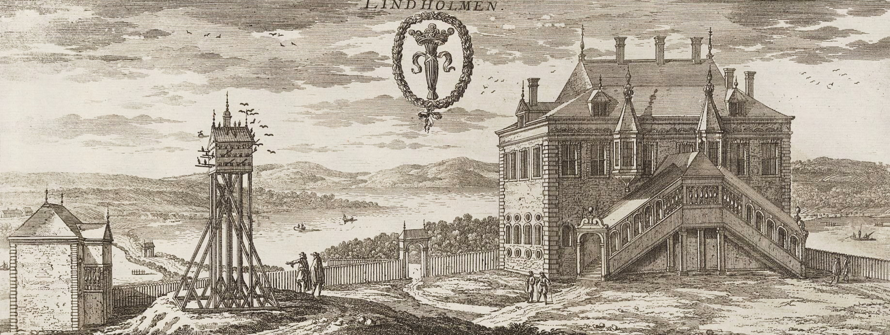 Lindholmen